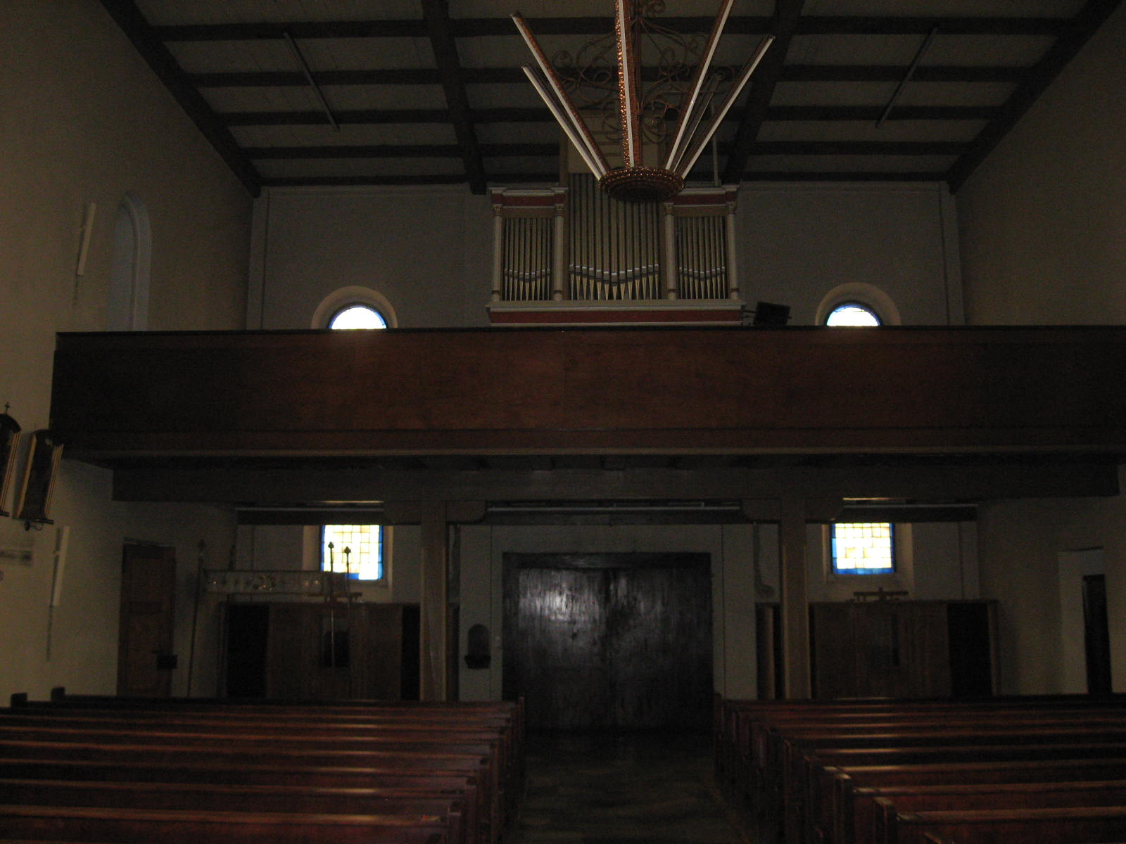 Chór i organy kościelne